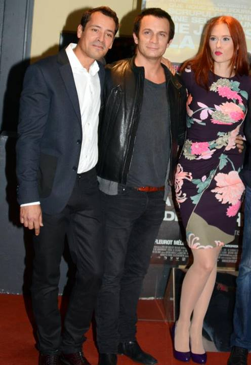 Jean-Baptiste Andrea, Jérémie Renier et Audrey Fleurot à l'avant-première du film "La Confrérie des larmes"